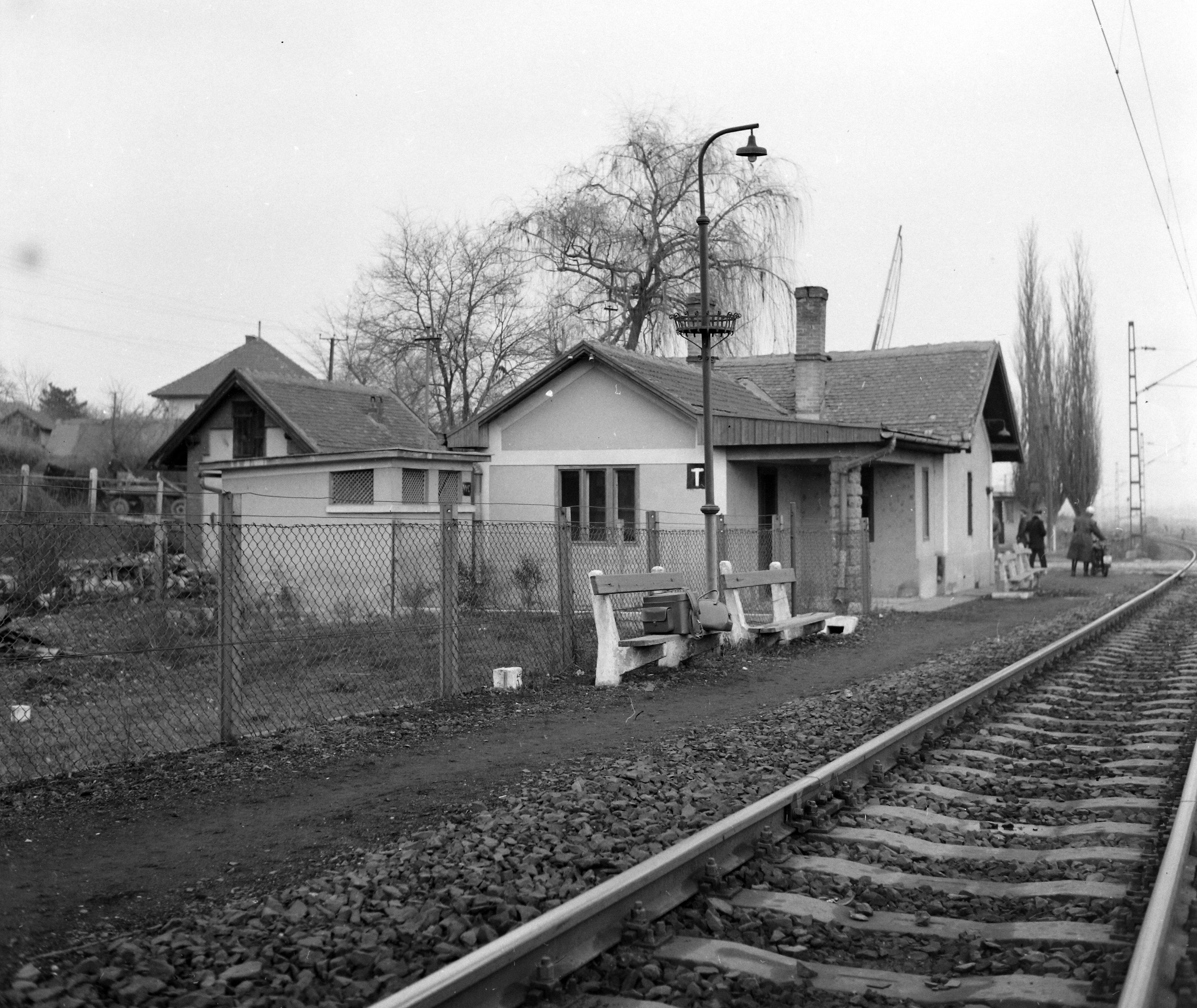 Hejőcsaba, vasútállomás. Location: Hungary Tags: train station, bench, barrier Title: Hejőcsaba, vasútállomás.